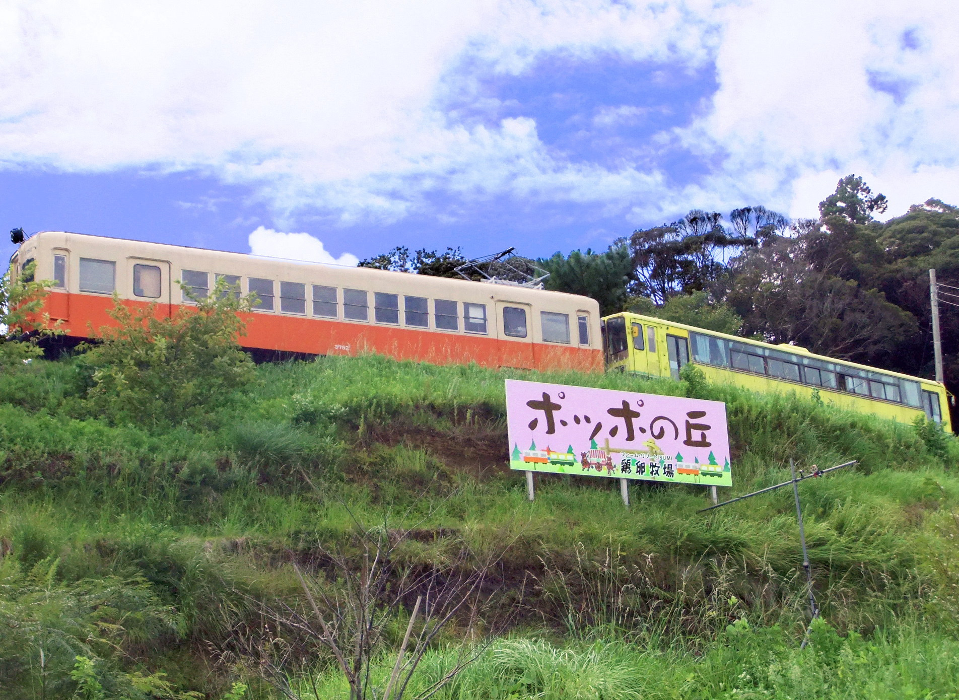 いすみポッポの丘 正面看板